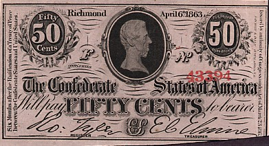 50 центов КША серии 1863 года, Ричмонд. Односторонние.